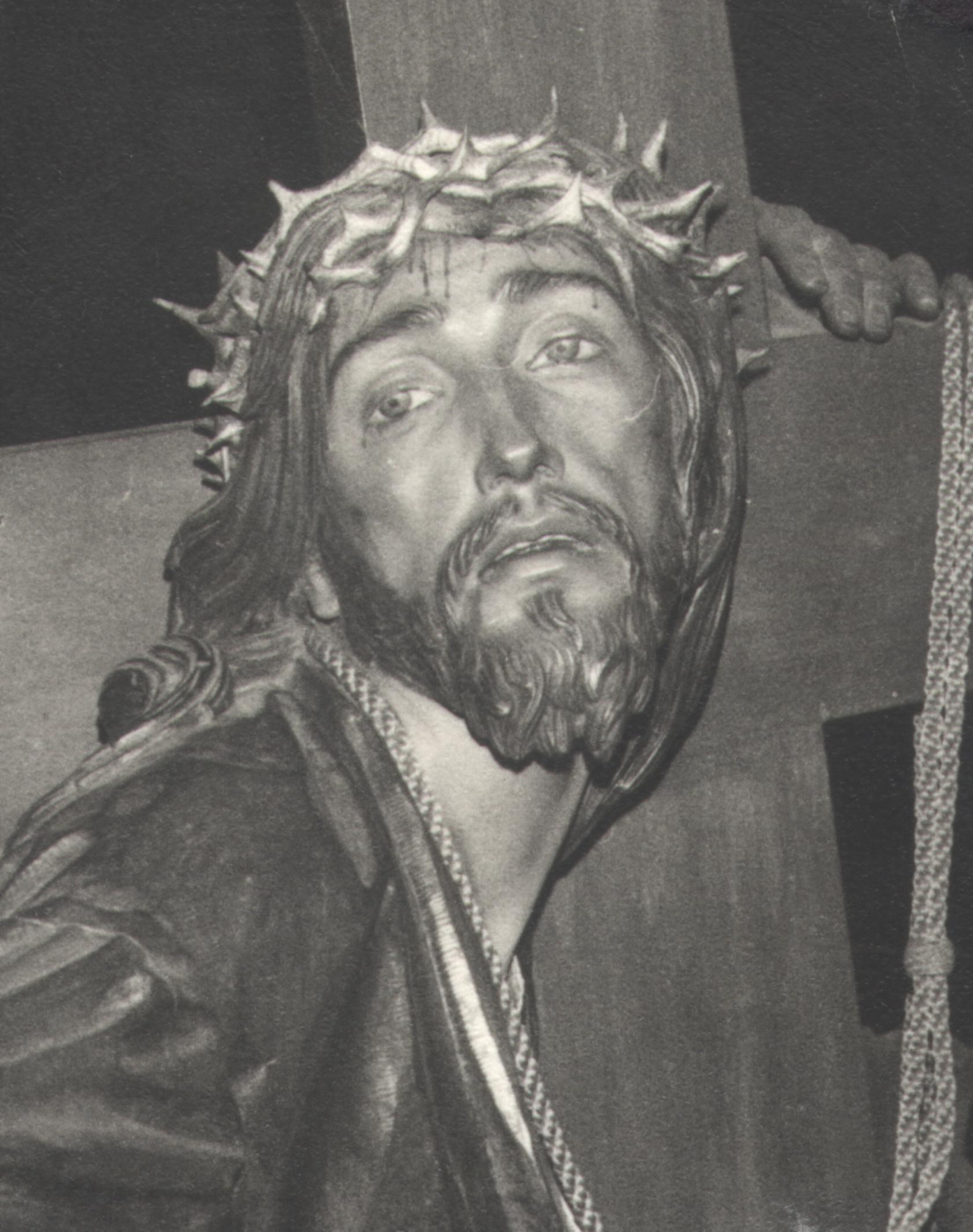 HIJAS DE JERUSALEM PROCESION LOS COLORAOS DETALLE CRISTO